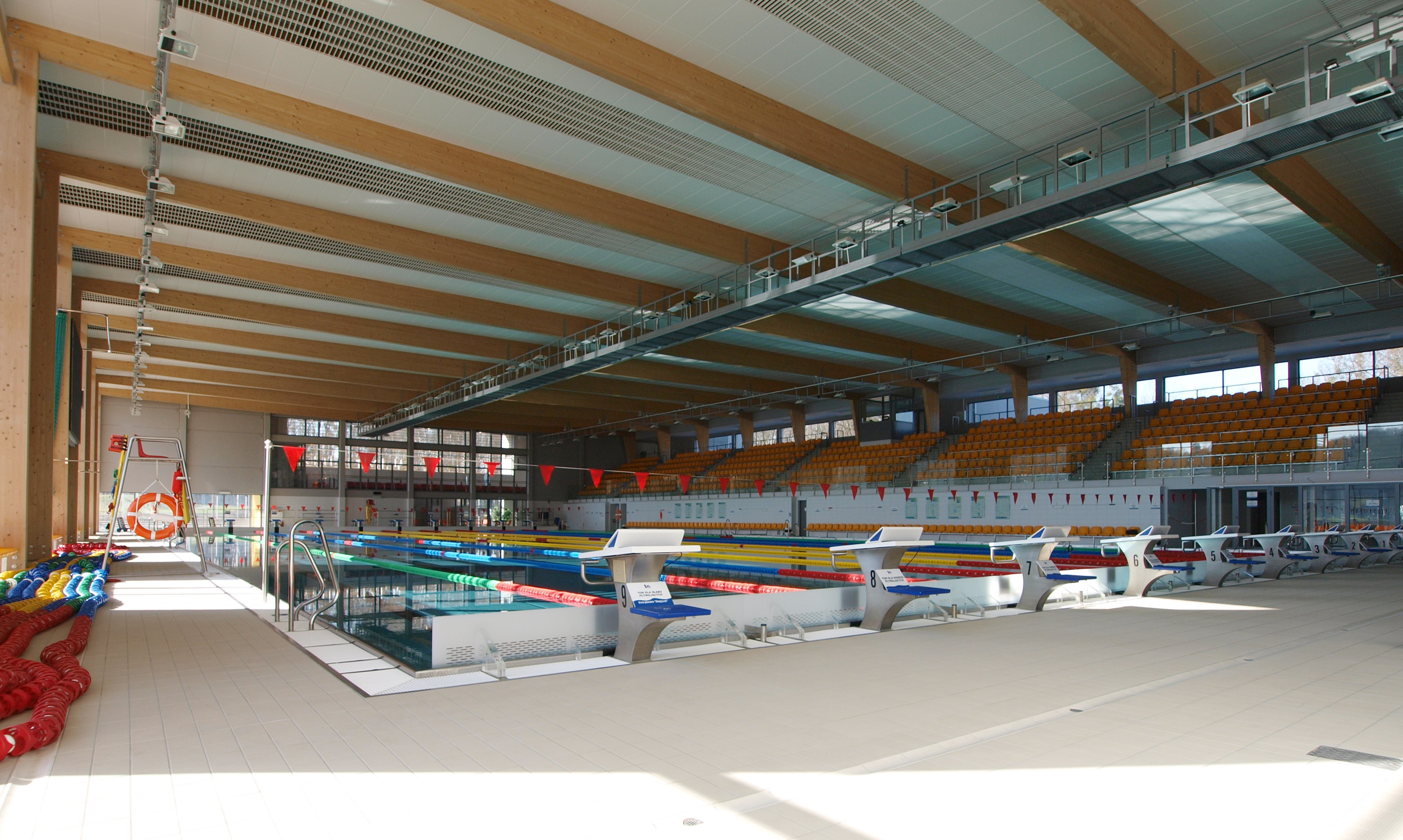 Kryta pływalnia "Olimpijczyk" w Gliwicach. Hala basenowa.